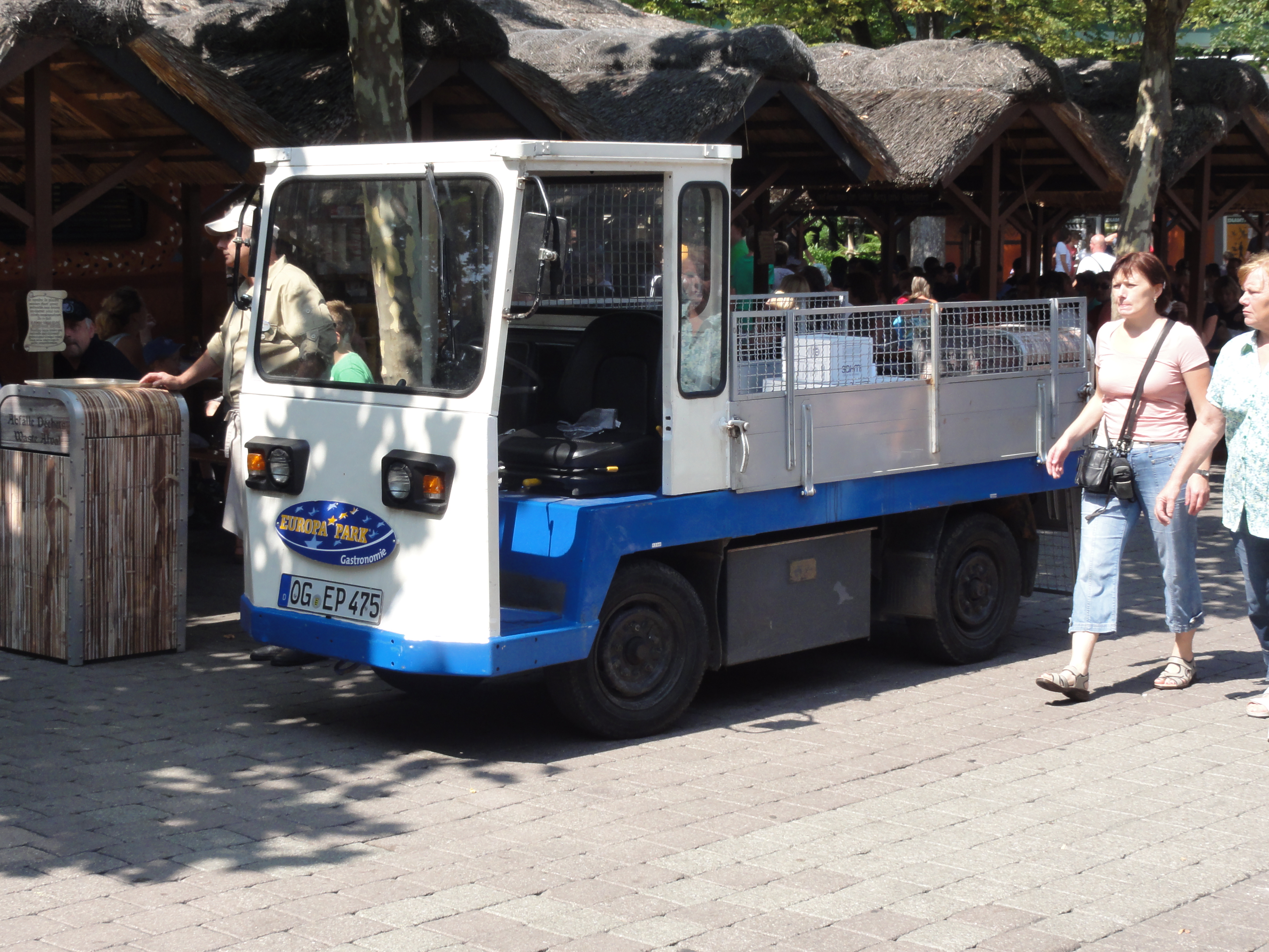 Véhicule électrique, Europa-Park, Rust, Bade-Wurtemberg, Allemagne.